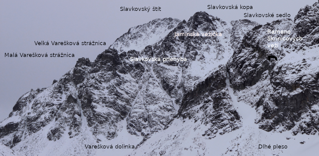 Slavkovská kopa, Vysoké Tatry. Vareškový pilíř nad Vareškovou dolinkou.